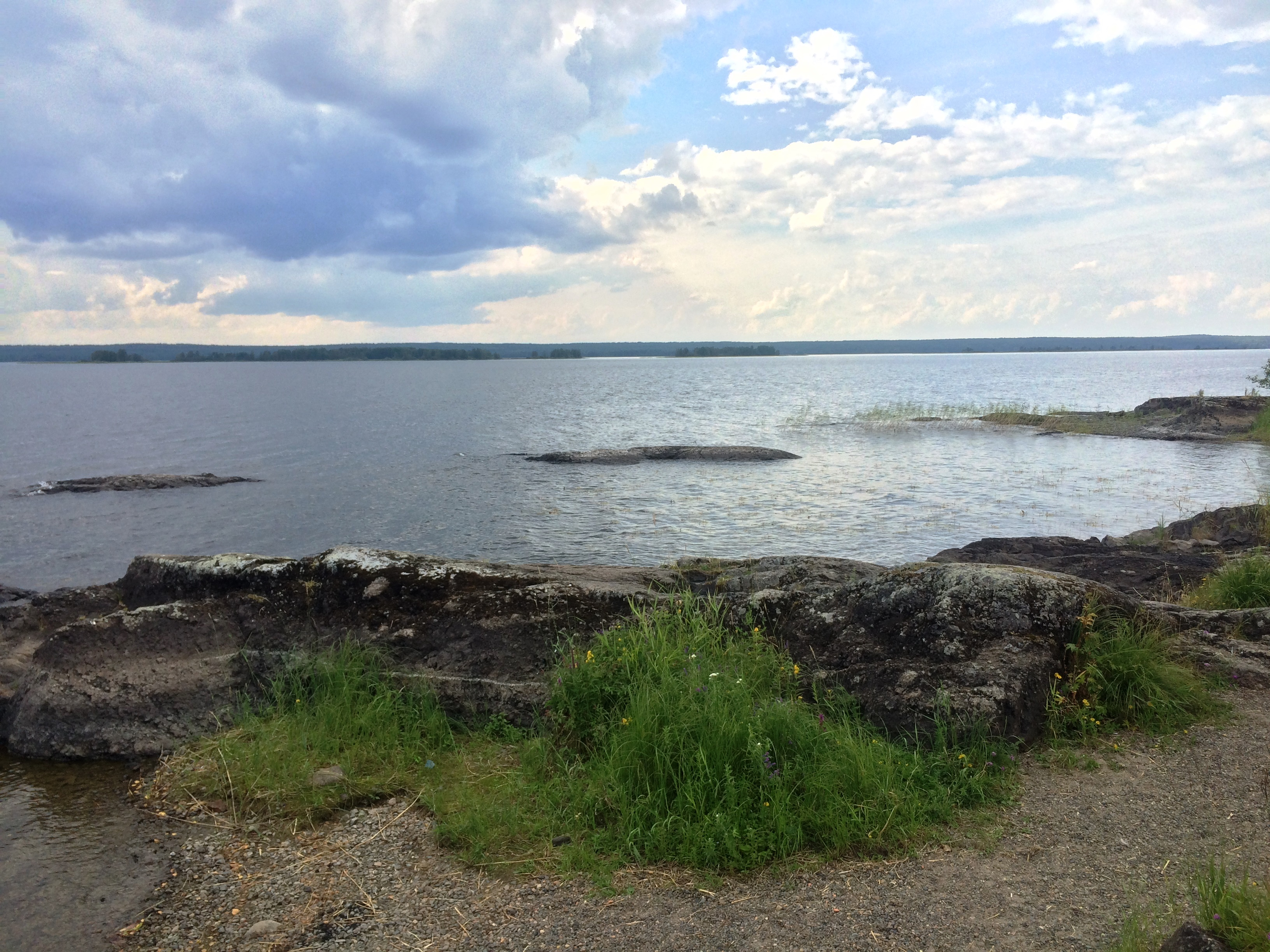 Укшозеро